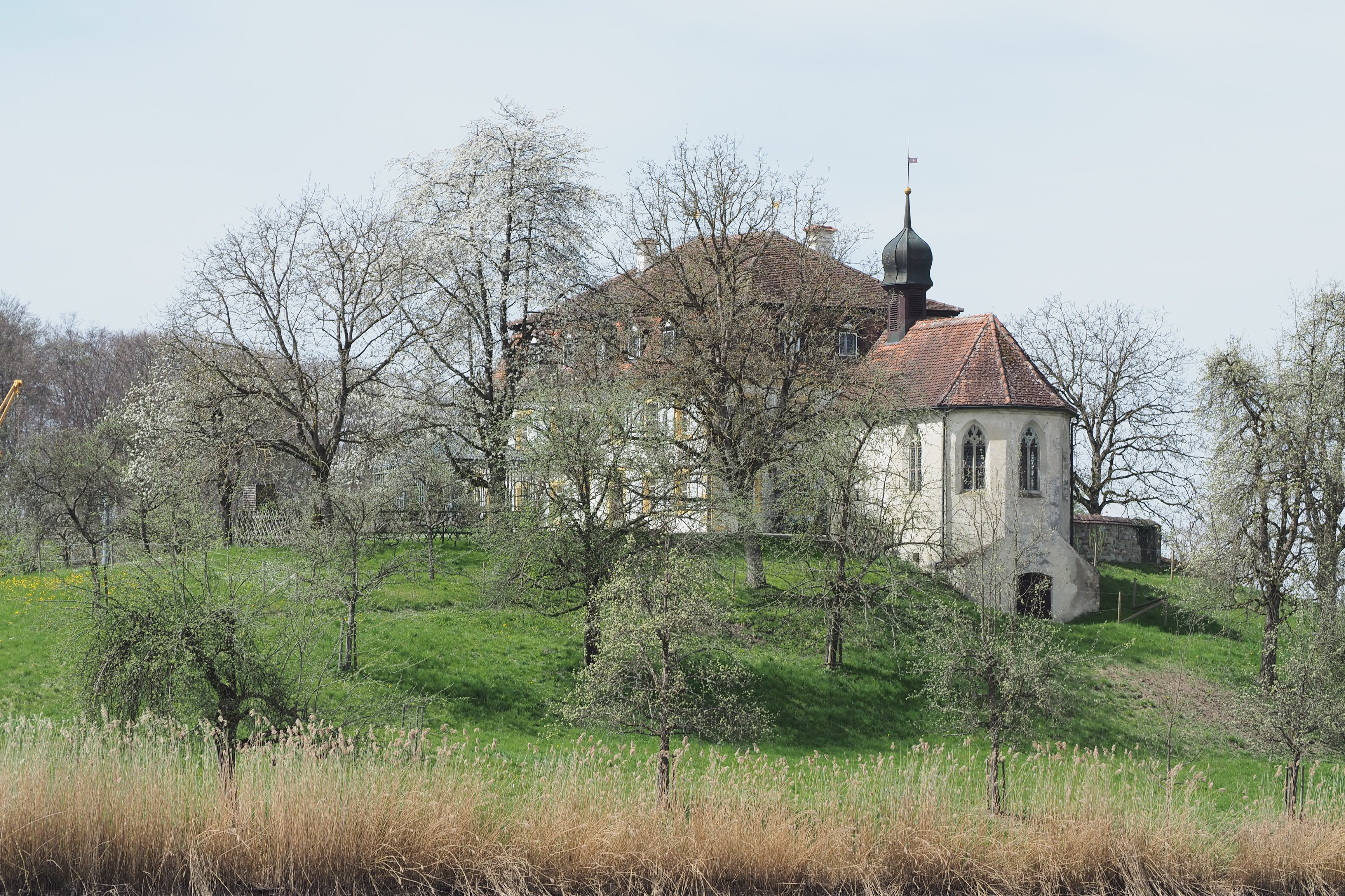 Kappelle am Salemer Killenweiher